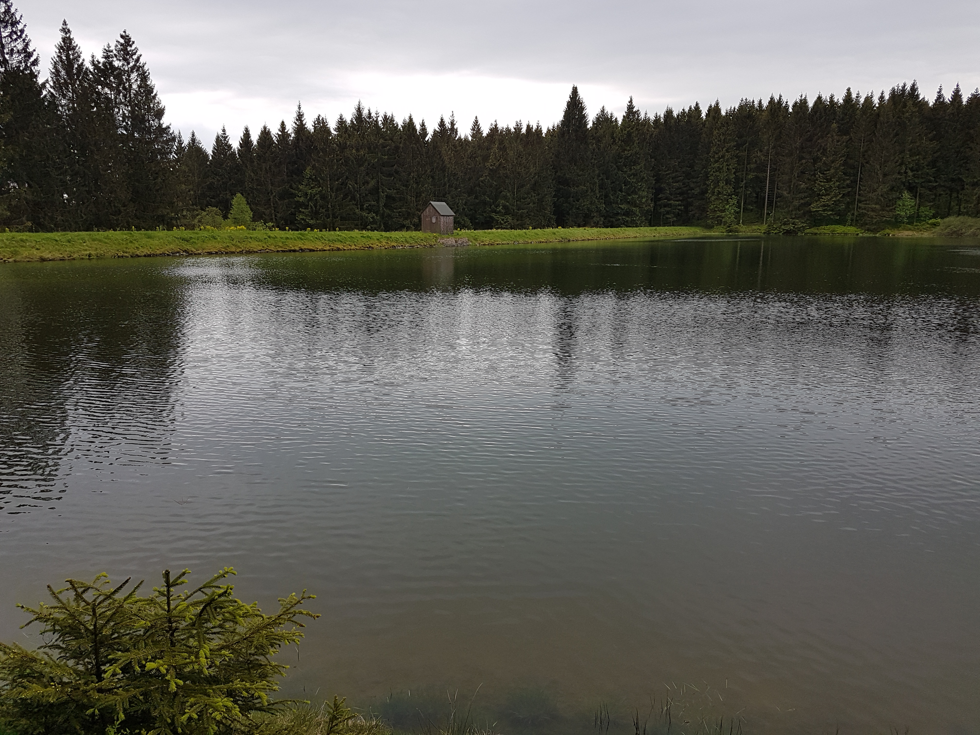 06.1-Oberer Einersberger Teich, 26-05-2019